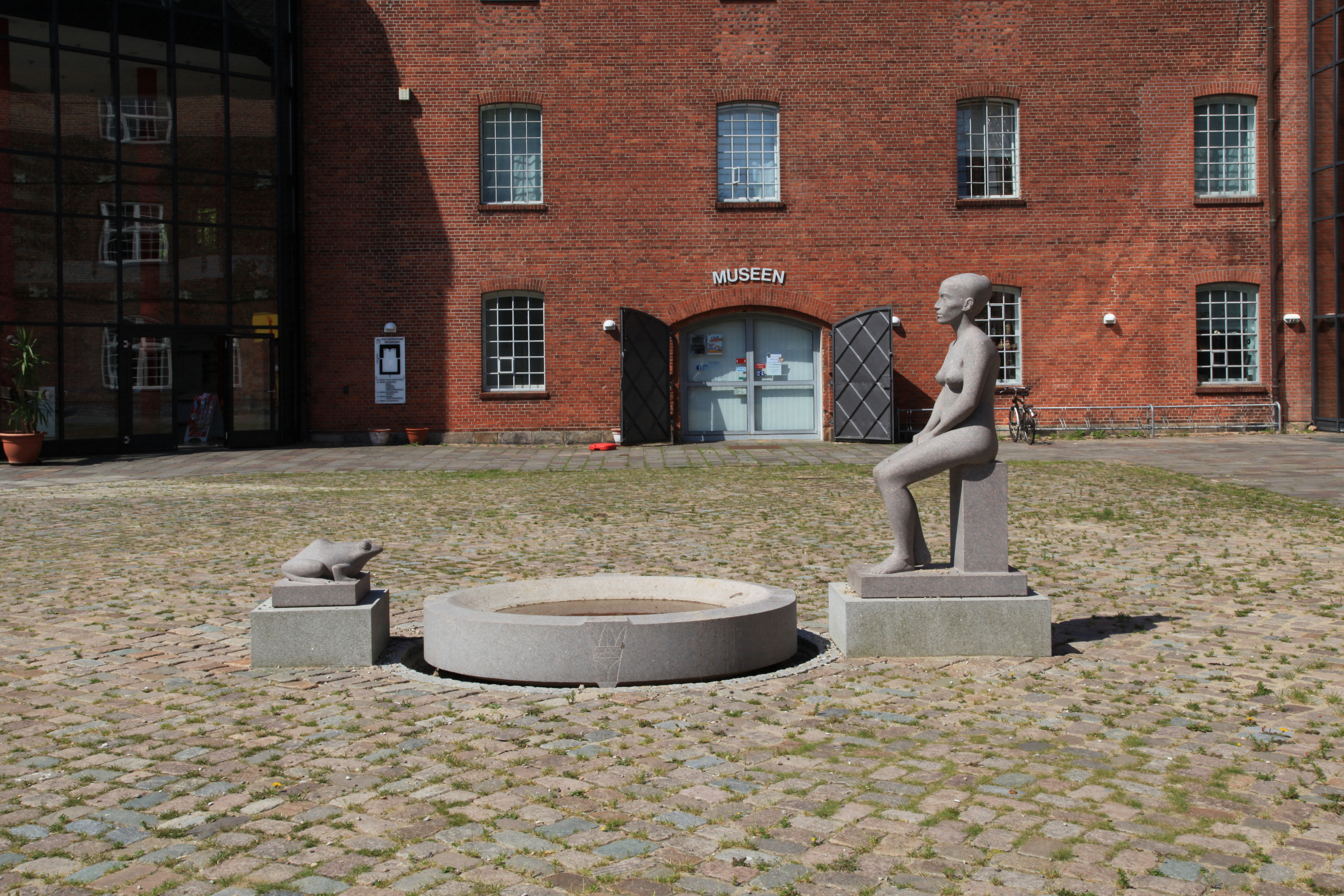 Froschkönig-Brunnen von Klaus Kütemeier im Arsenal-Innehof an der Arsenalstraße in Rendsburg